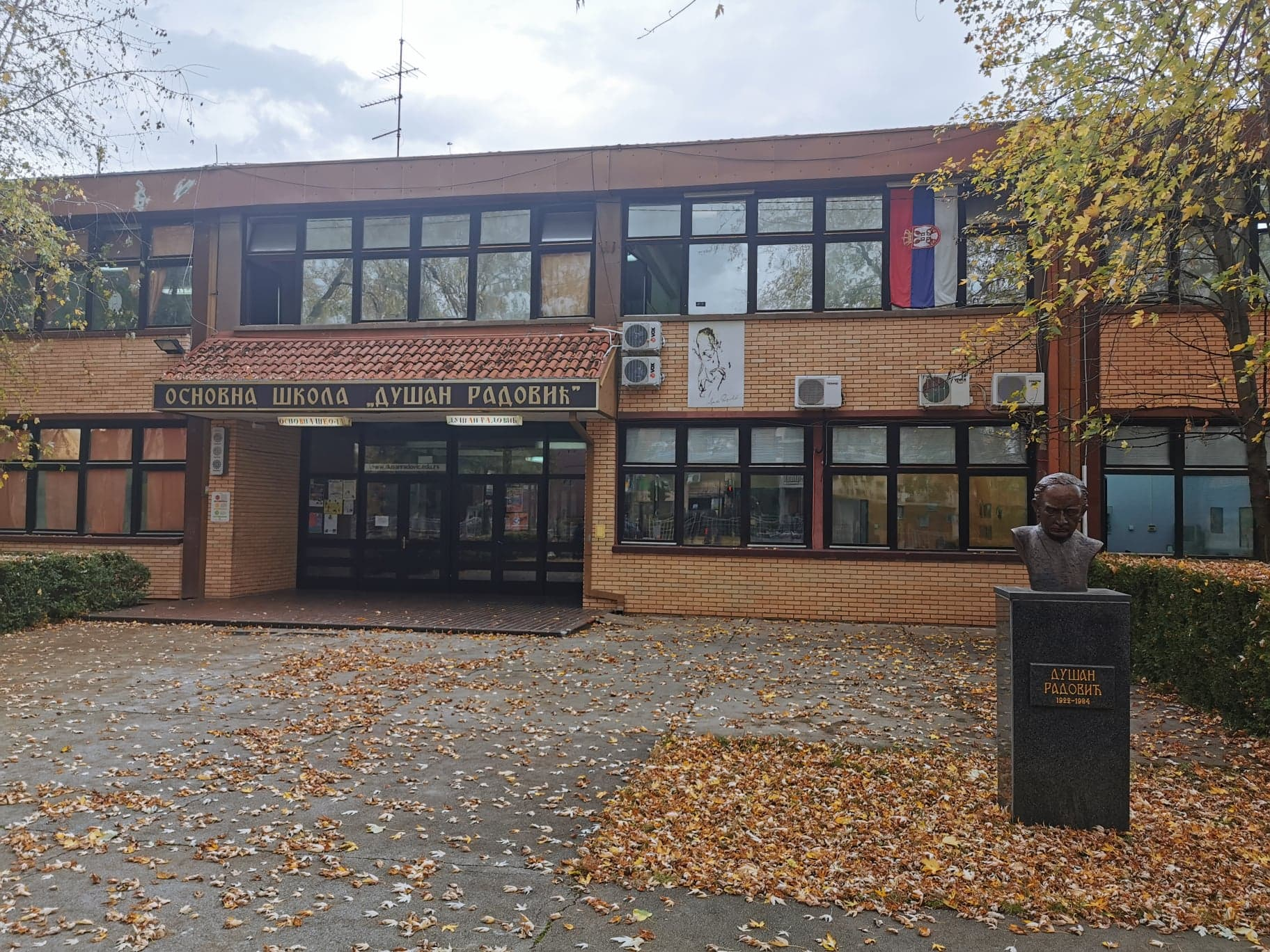 ОШ Душан Радовић Ниш - главни улаз